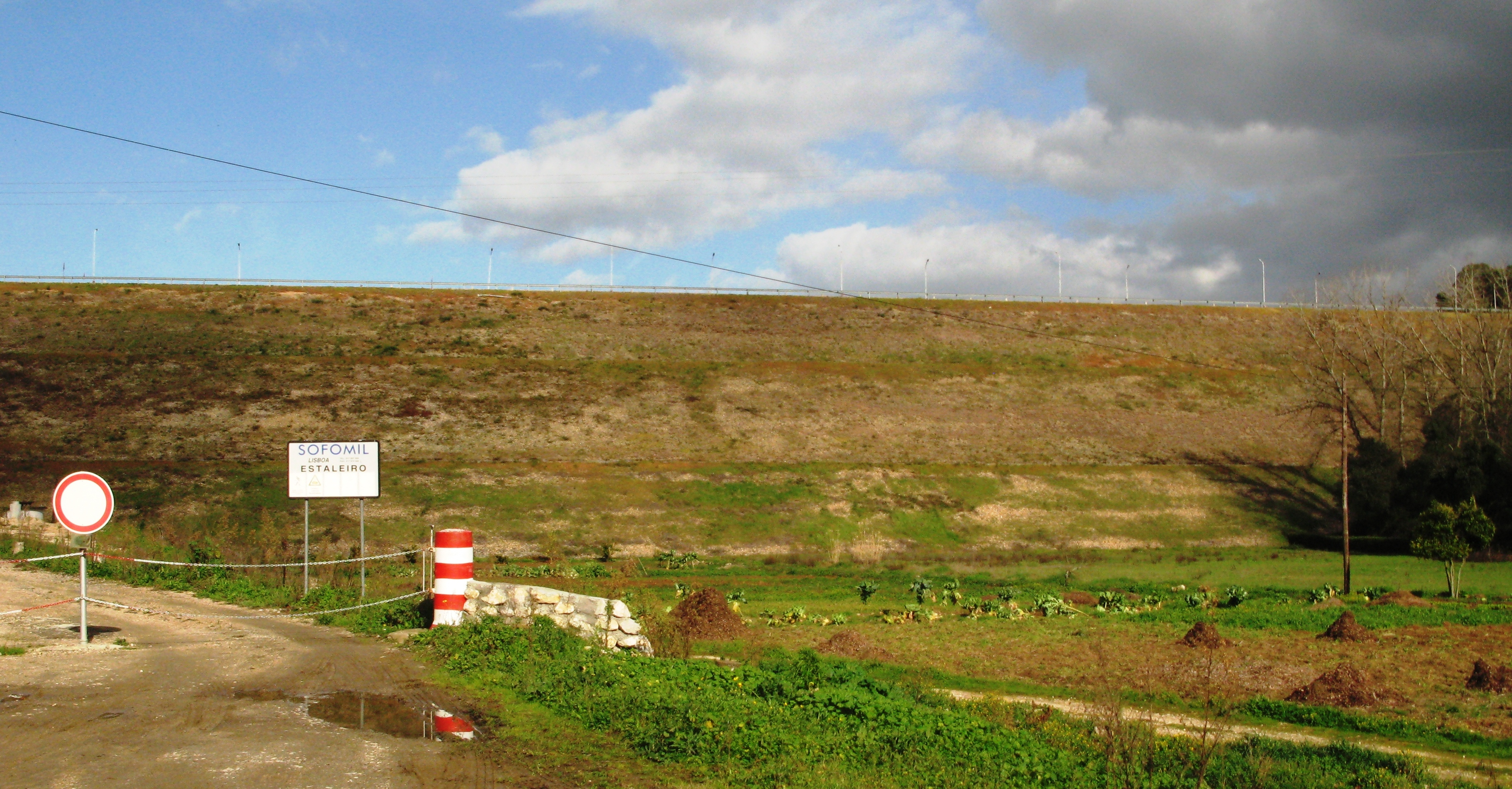 Le Barrage de Montargil vu d'en bas